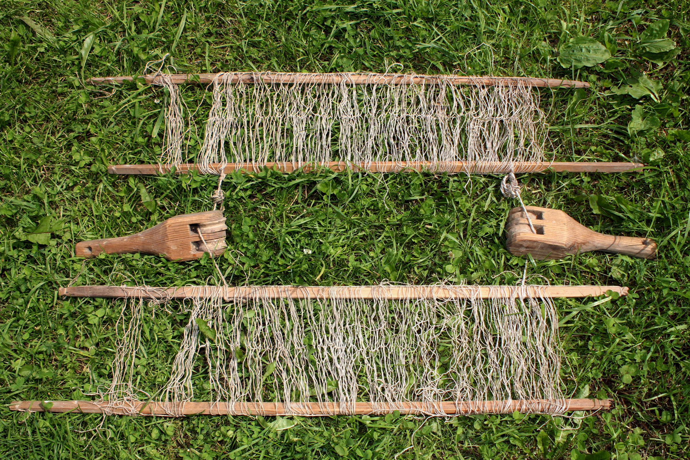 «ніты», або «нічальніцы». Гарадоцкі раён Віцебскай вобласці